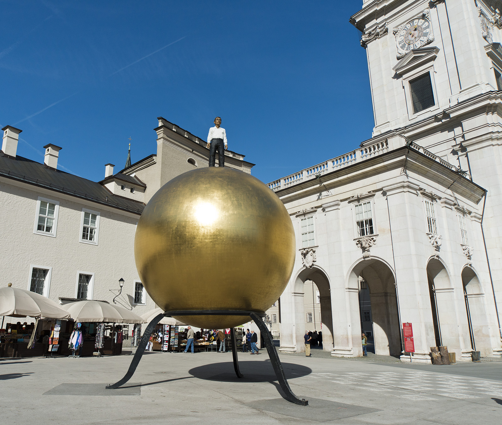 Sphaera